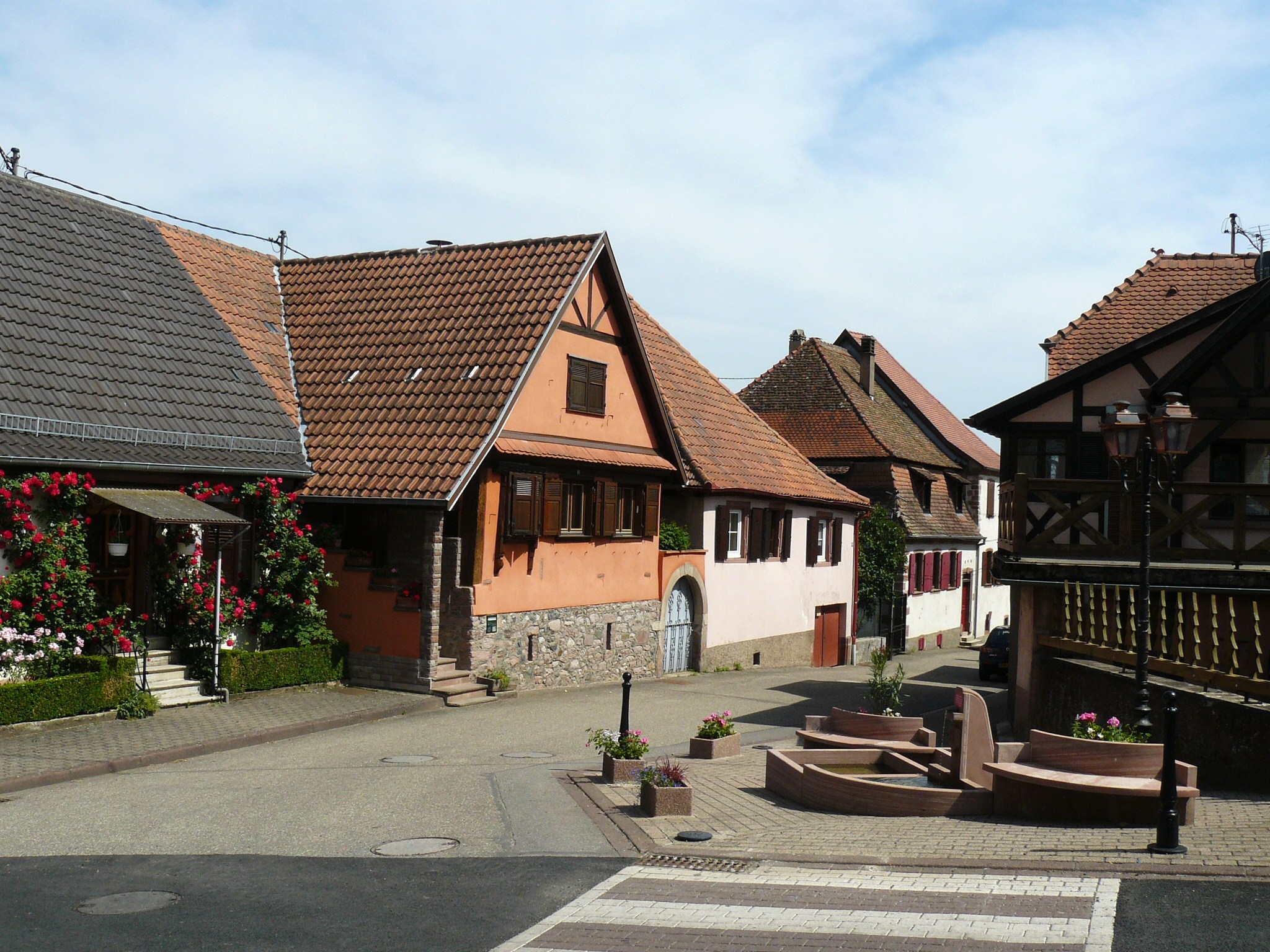 Village de Saint-Nabor